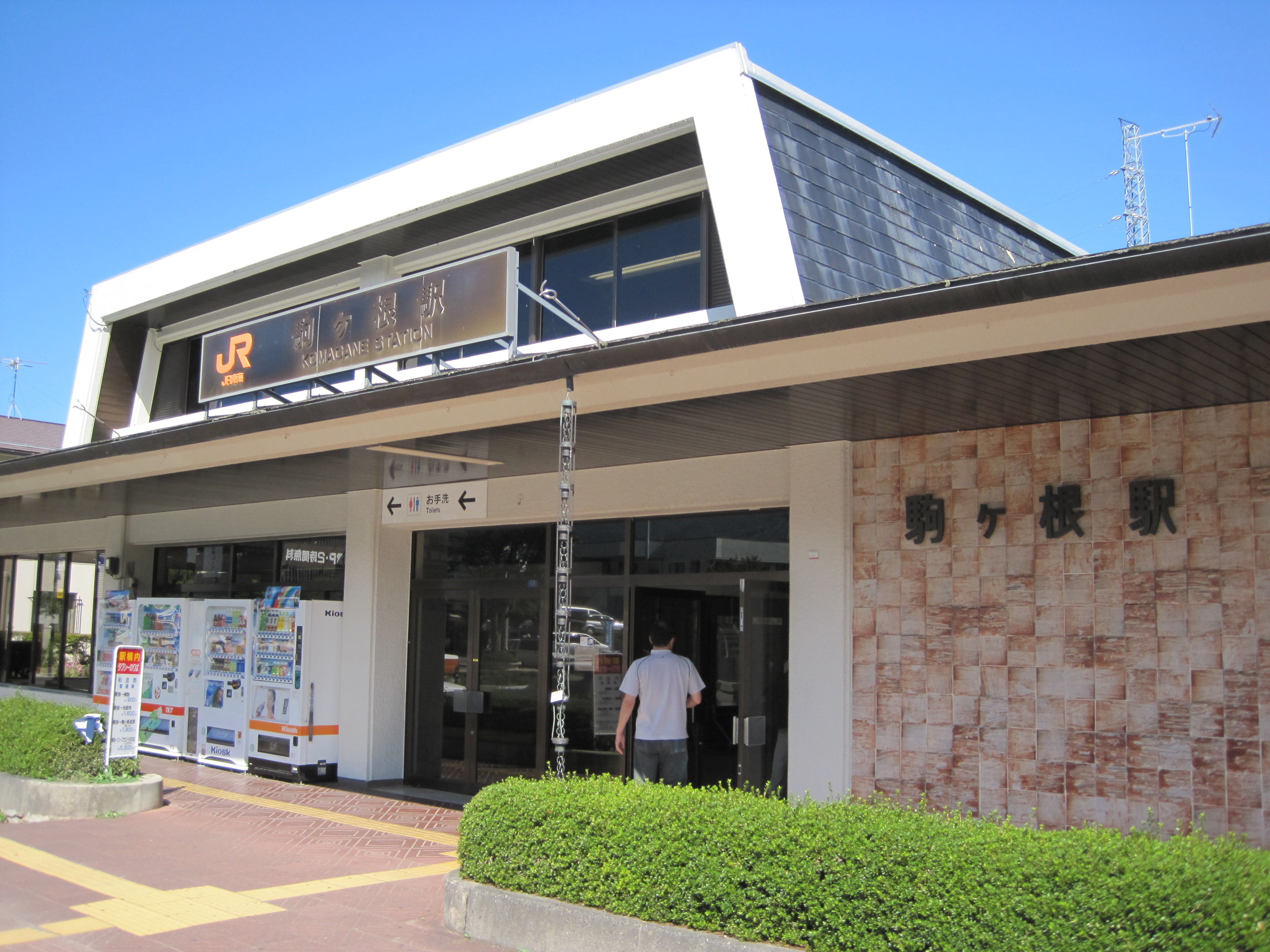 駒ヶ根駅近映